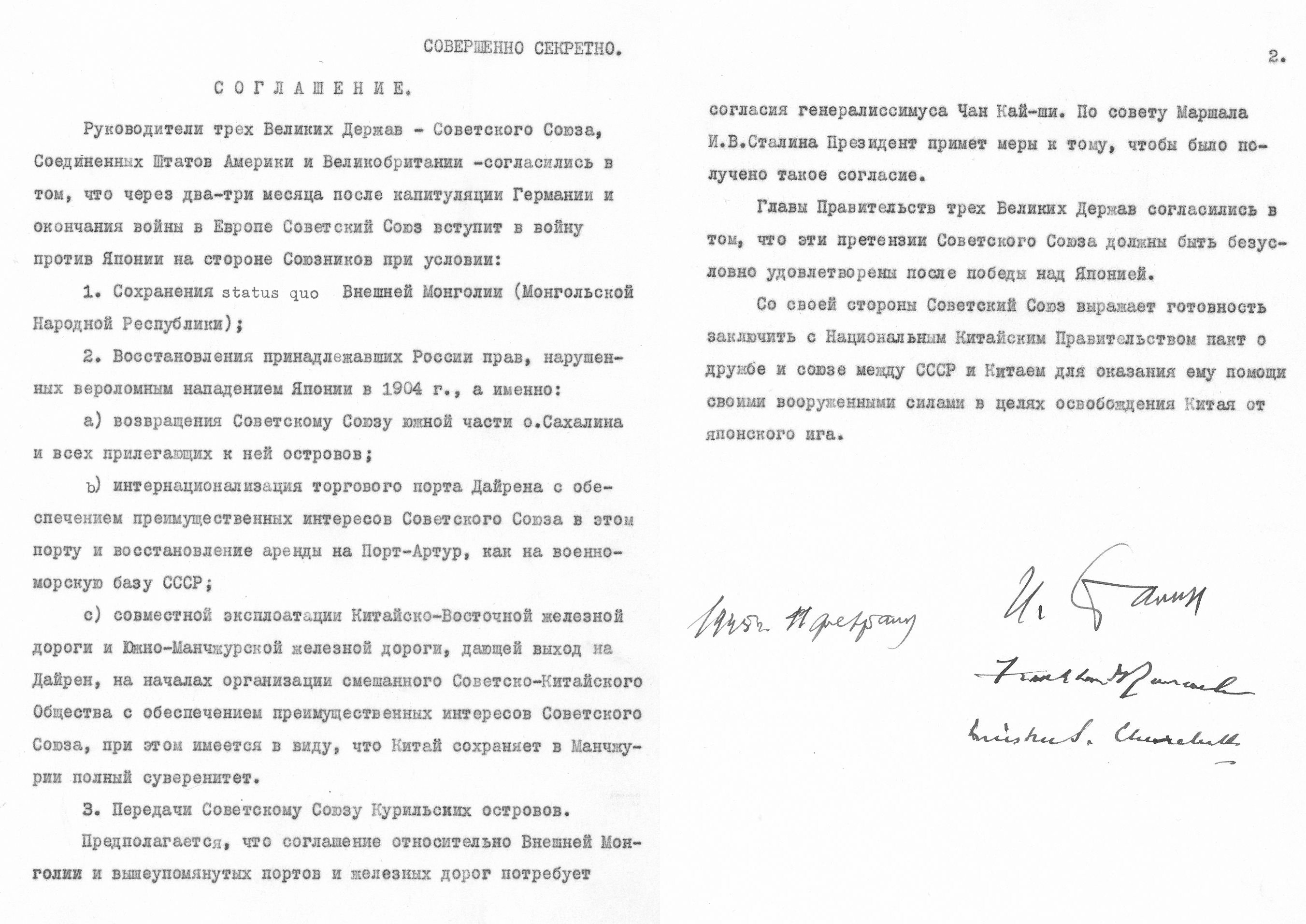 Соглашение о вступлении СССР в войну против Японии. 11 февраля 1945 г.